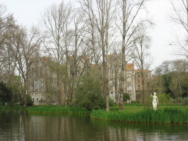 Caldas da Rainha (Portugal) - D. Carlos I park